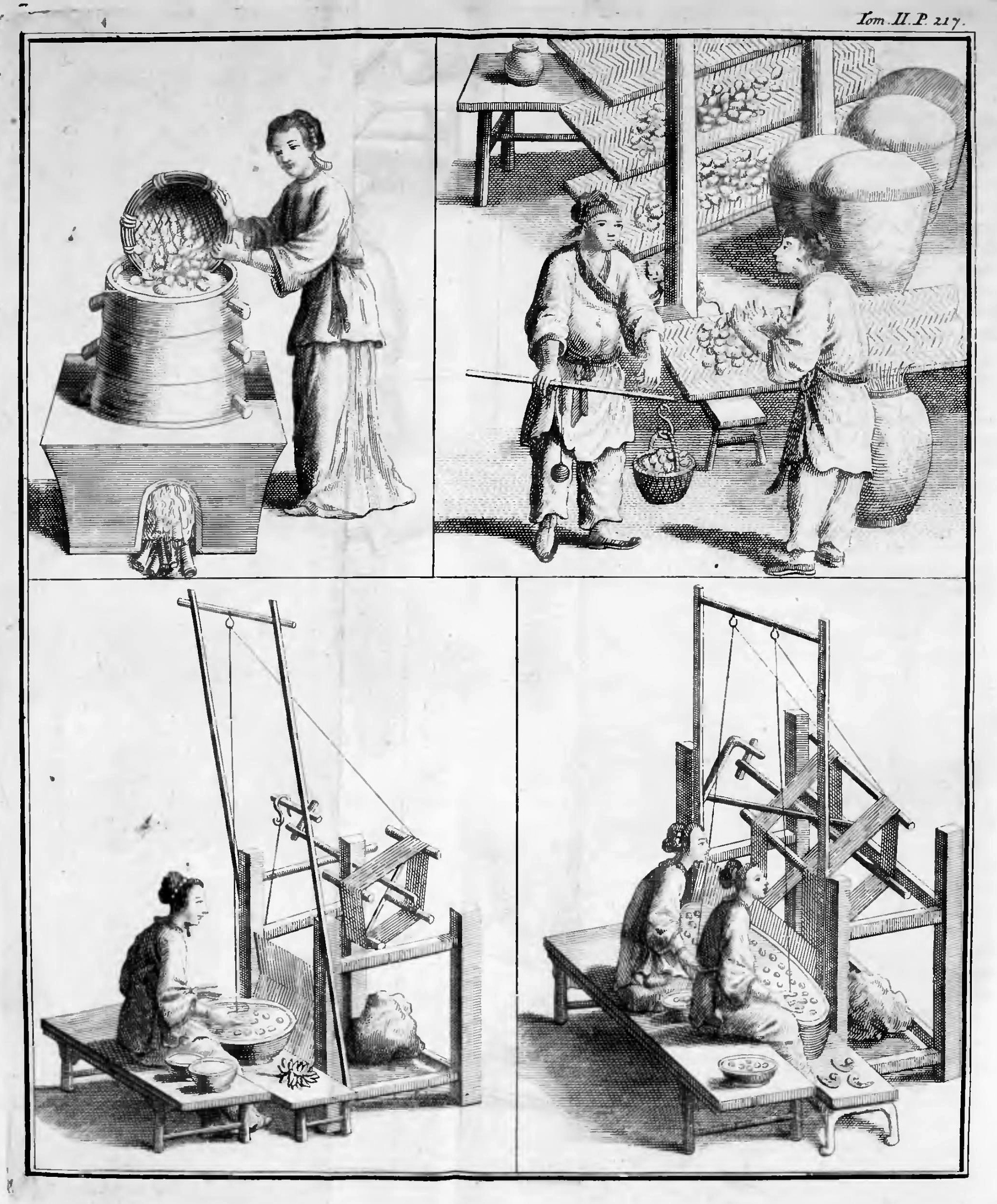 Gravure extraite de Description de la Chine, édition de La Haye 1736. Volume 2. Page 217. Ouvriers en porcelaine et en soie.